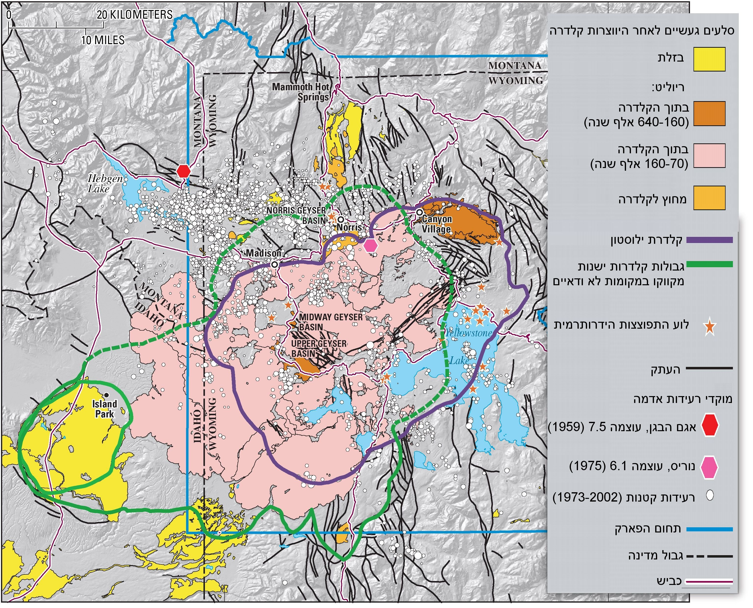 Yellowstone Caldera